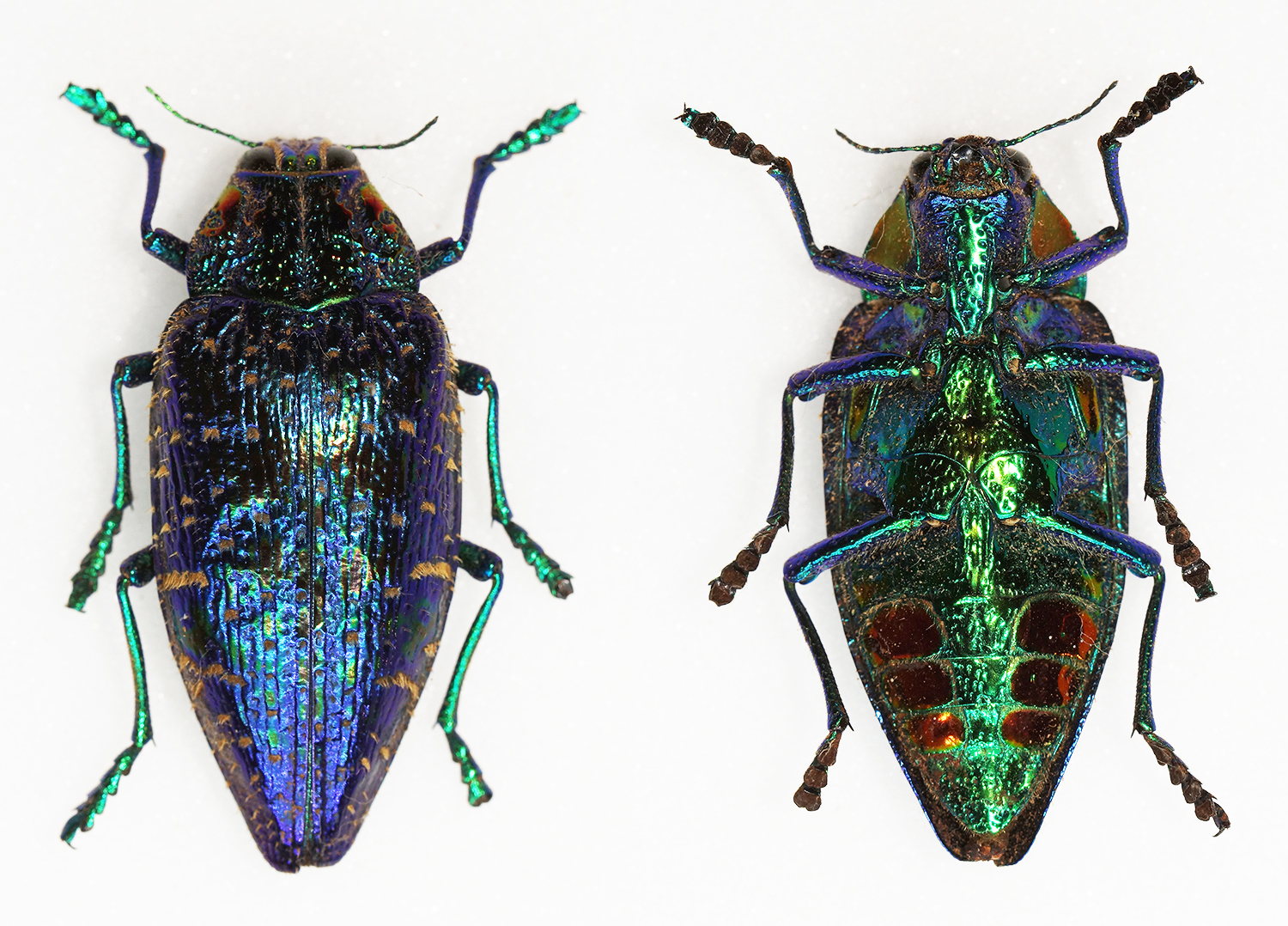 Klug,1833 Sex: Female Data: 02-2009 - Antara - Madagascar Size: 37mm